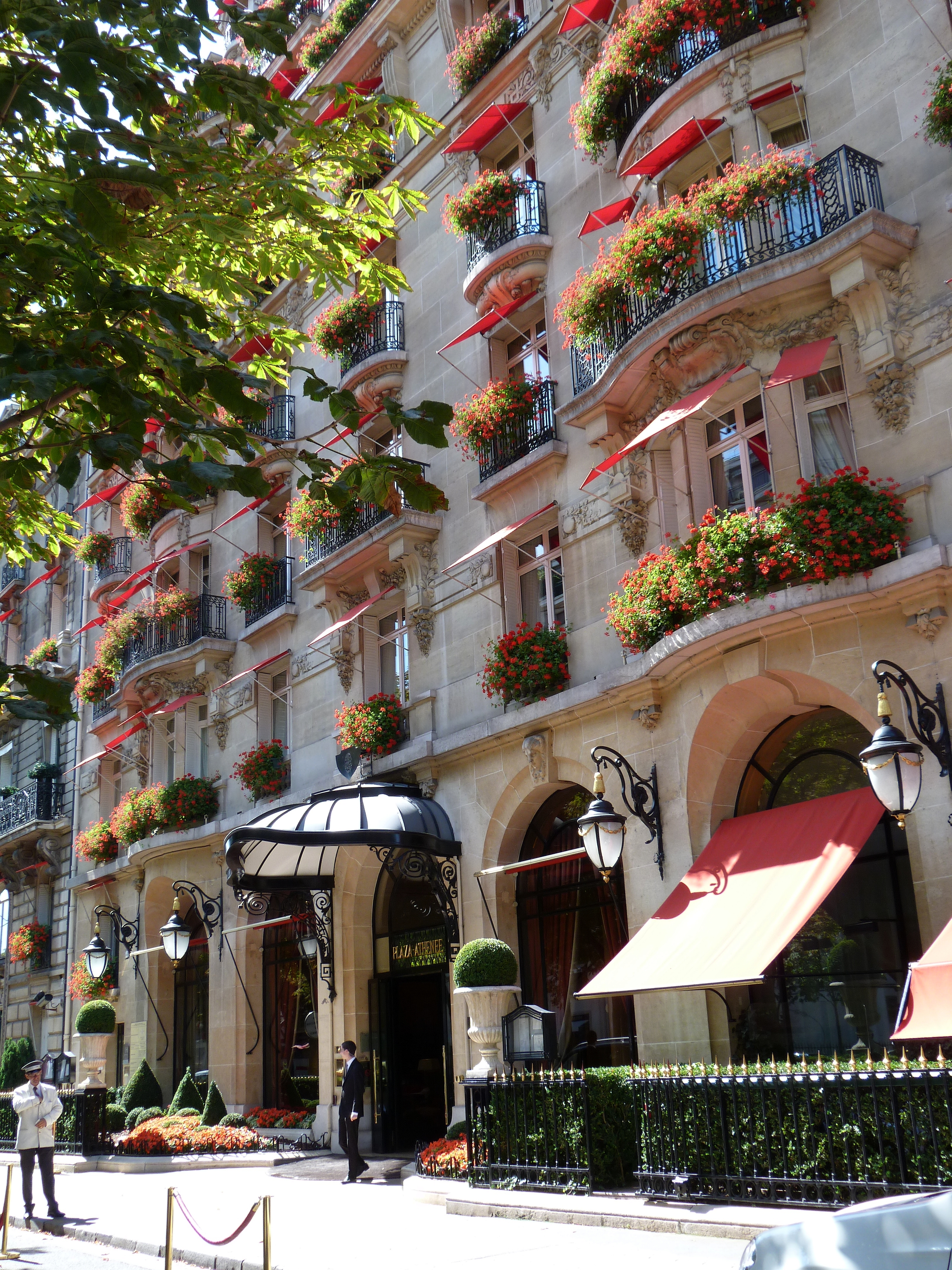 Le Palace Plaza Athénée avenue Montaigne à Paris (8e arrond.)